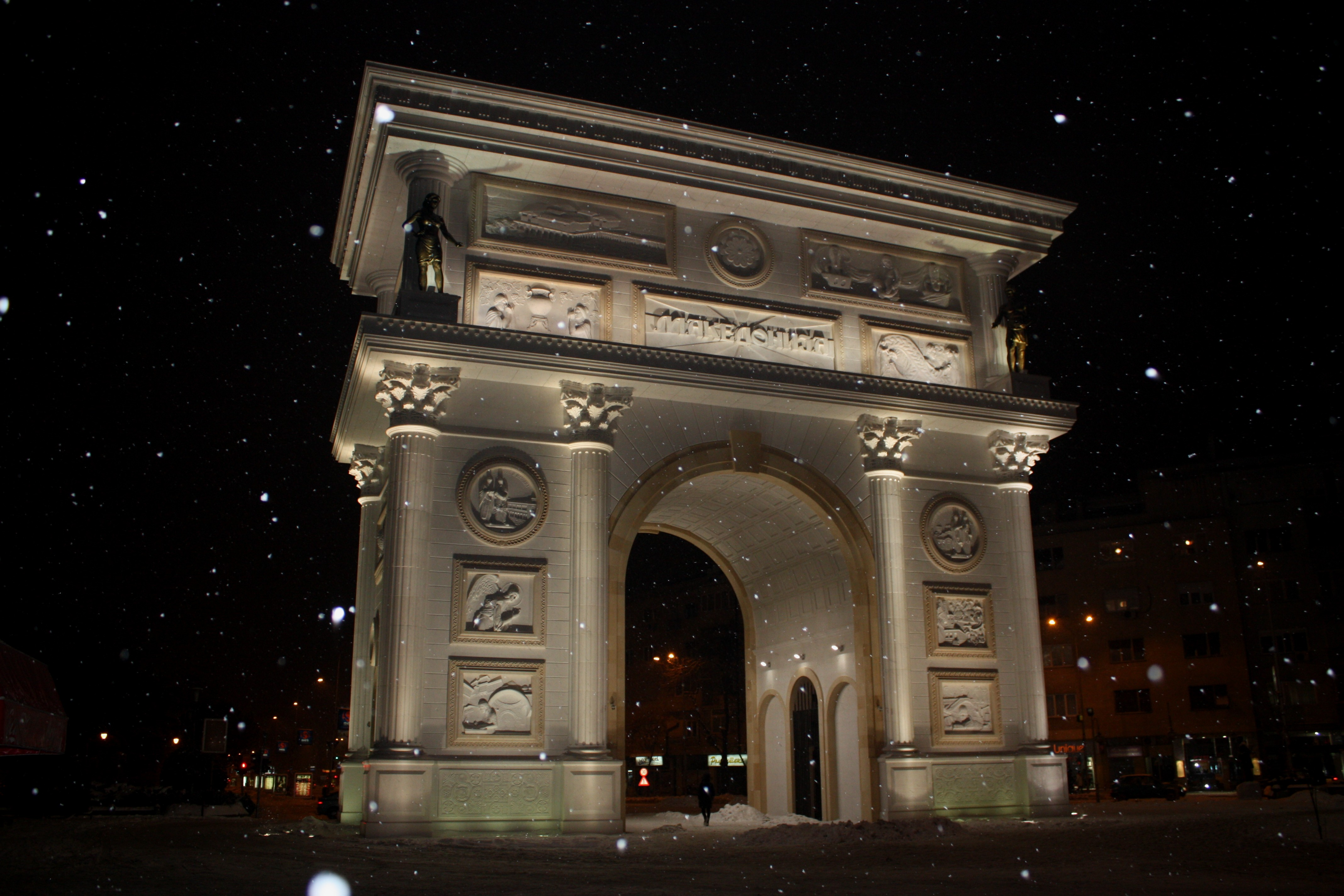 Porta Makedonija